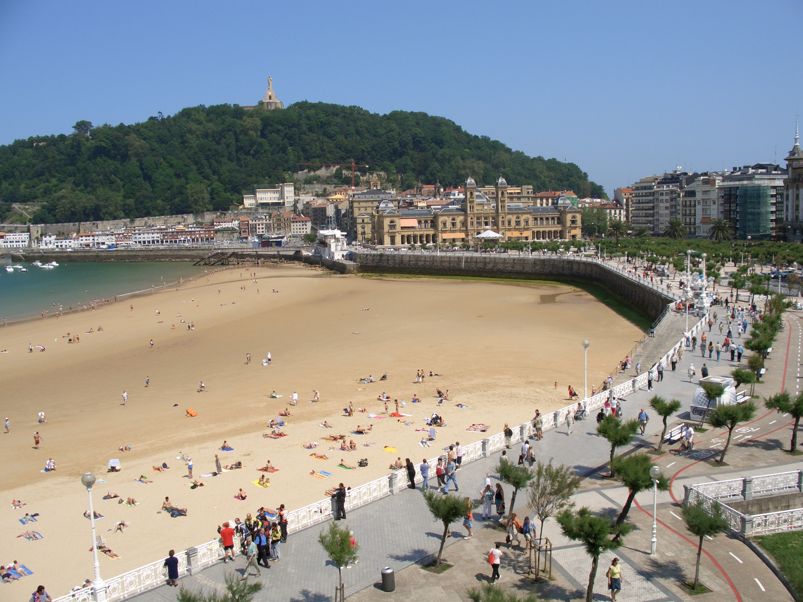 San Sebastian